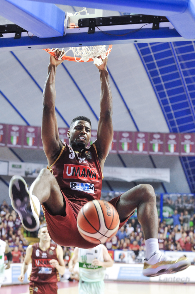 Melvin Ejim, Reyer Venezia, schiaccia